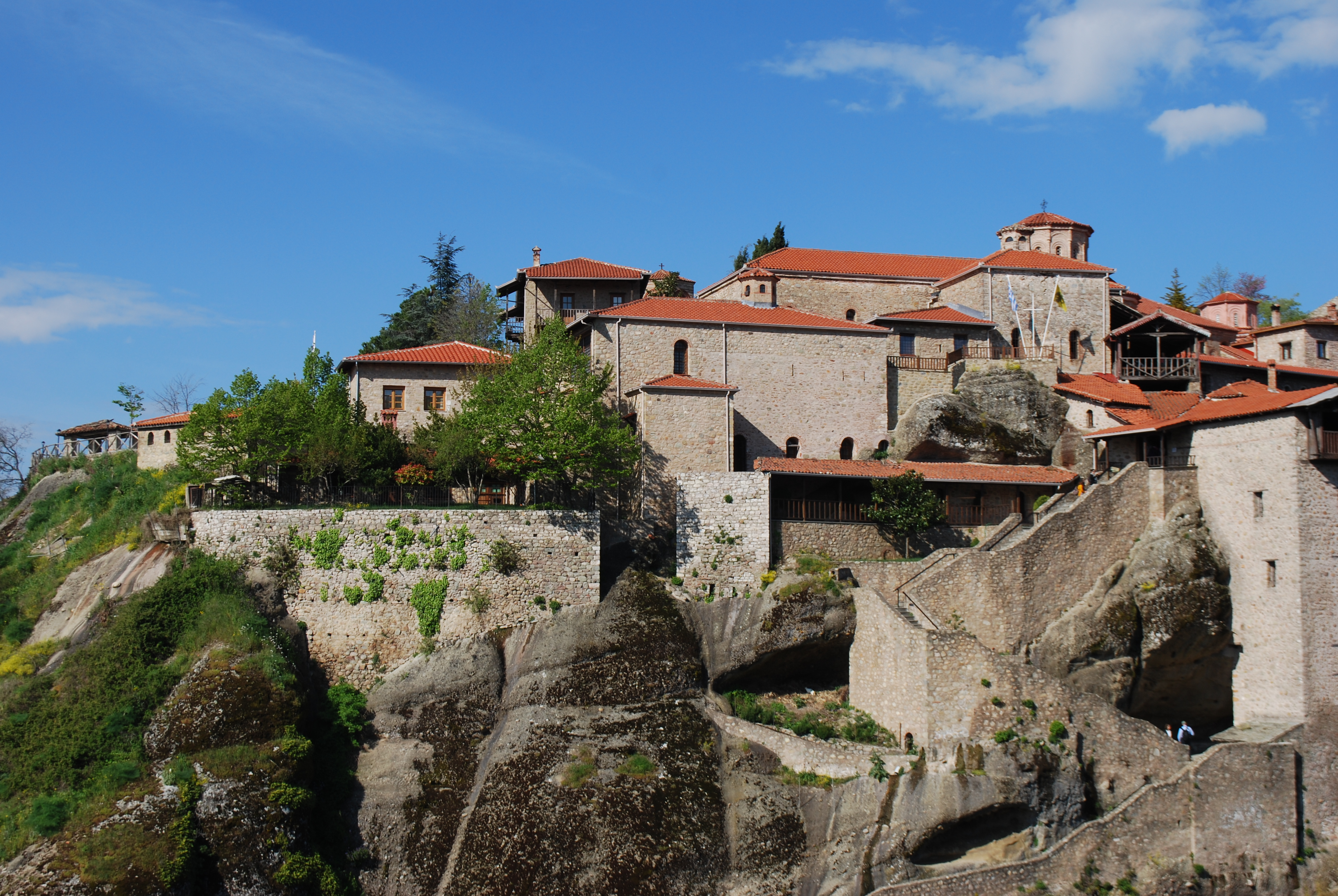 Vue du Grand Météore.